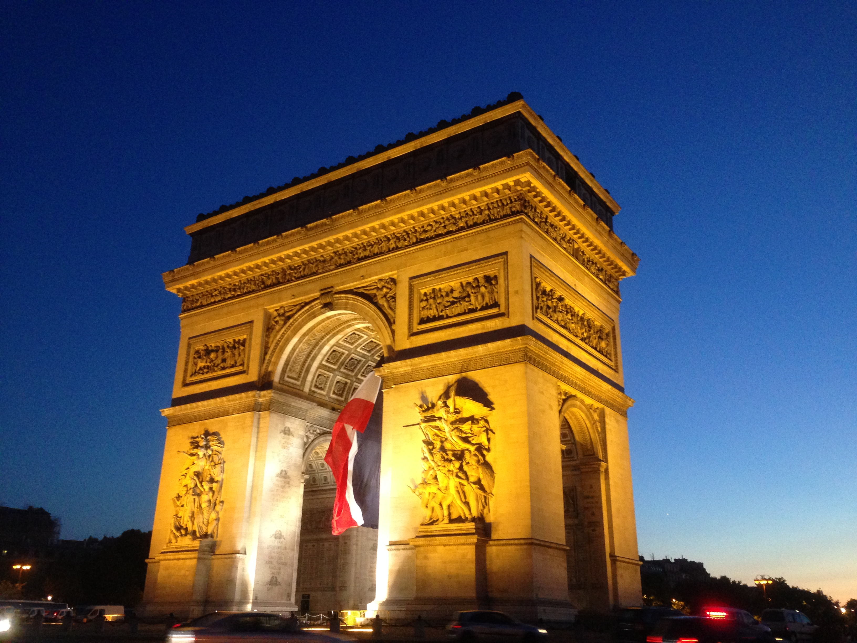 Monument arc de triomphe